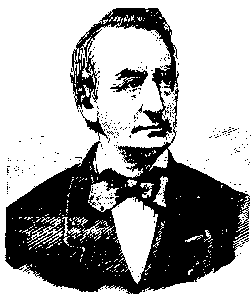 Statsråd Christian Jensen.